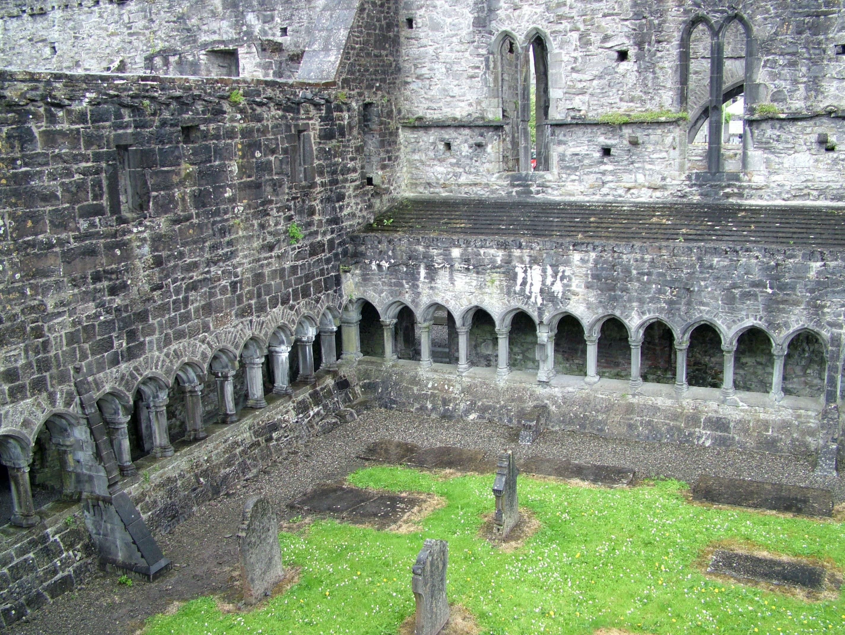 Sligo, Ireland, Kreuzgang der Abbey